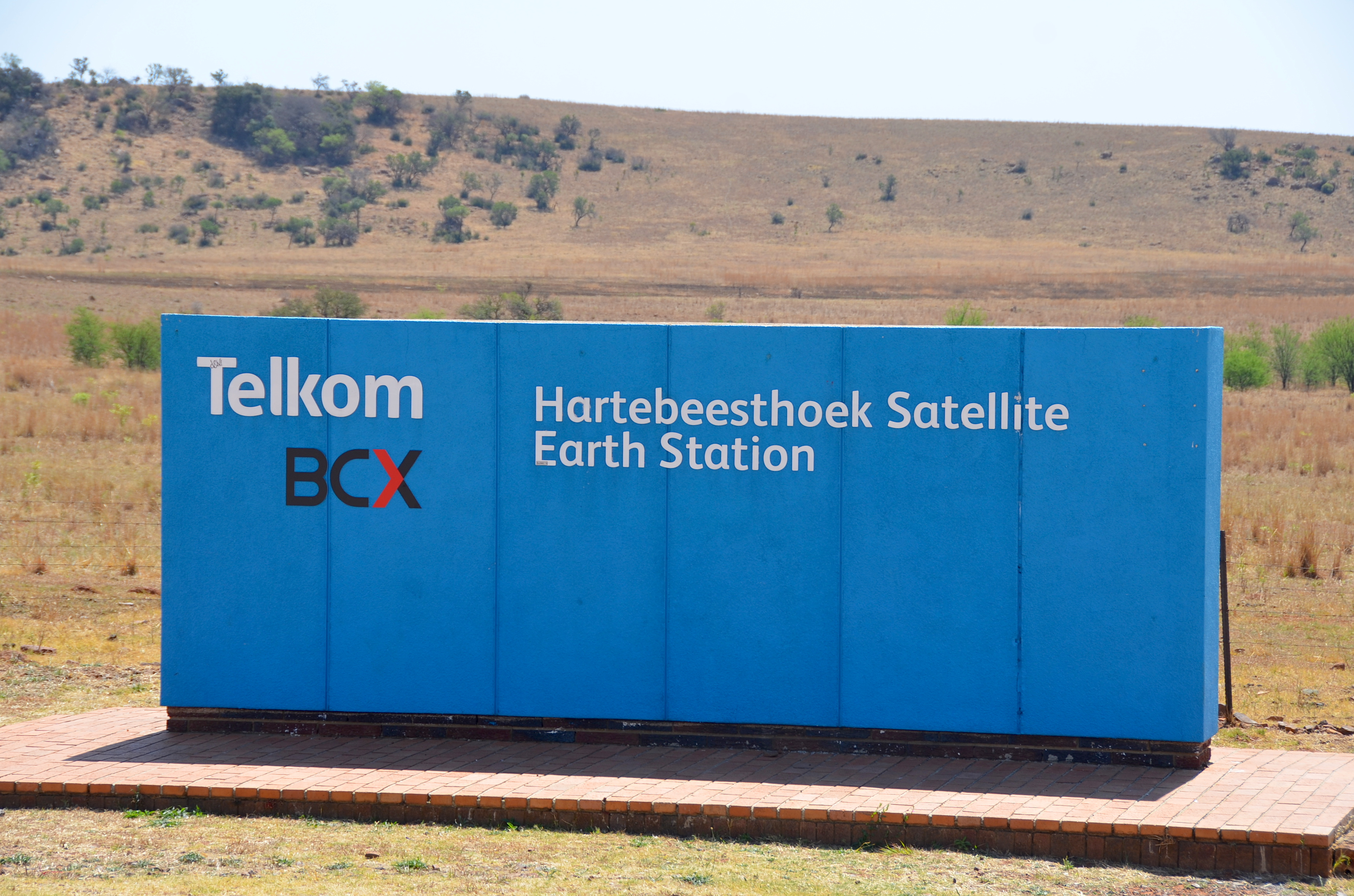 Einfahrt Hartebeesthoek Satellite Earth Station, Spacestream Zentrum der Telkom (BCX)